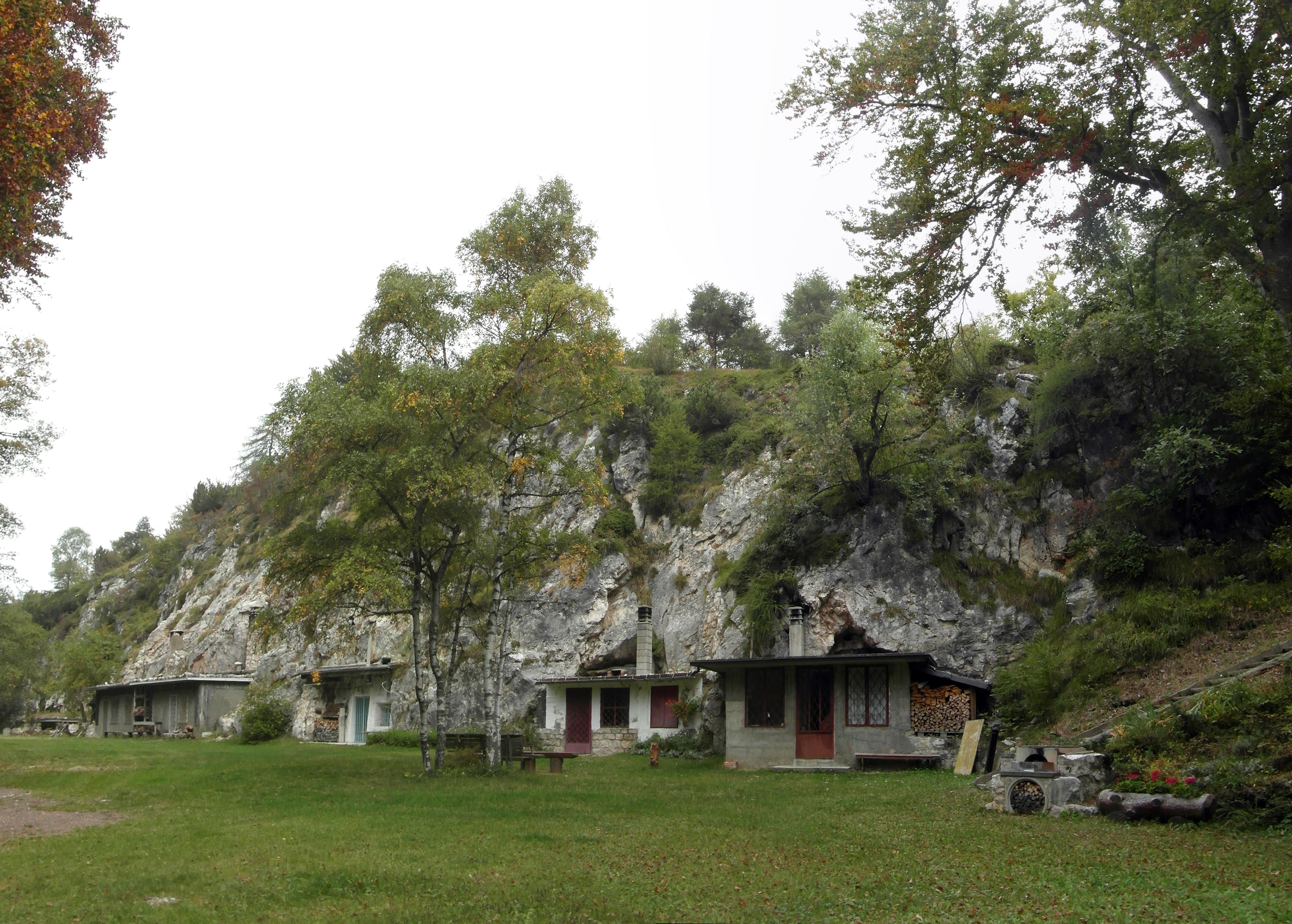 Riustilizzo di baraccamenti austro-ungarici